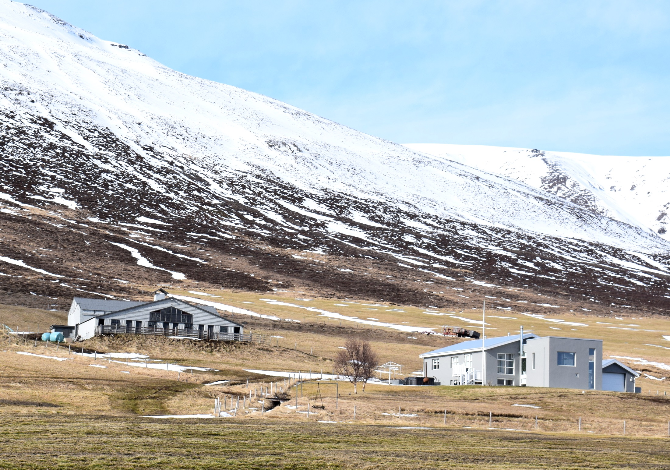 Ingvarir í Svarfaðardal